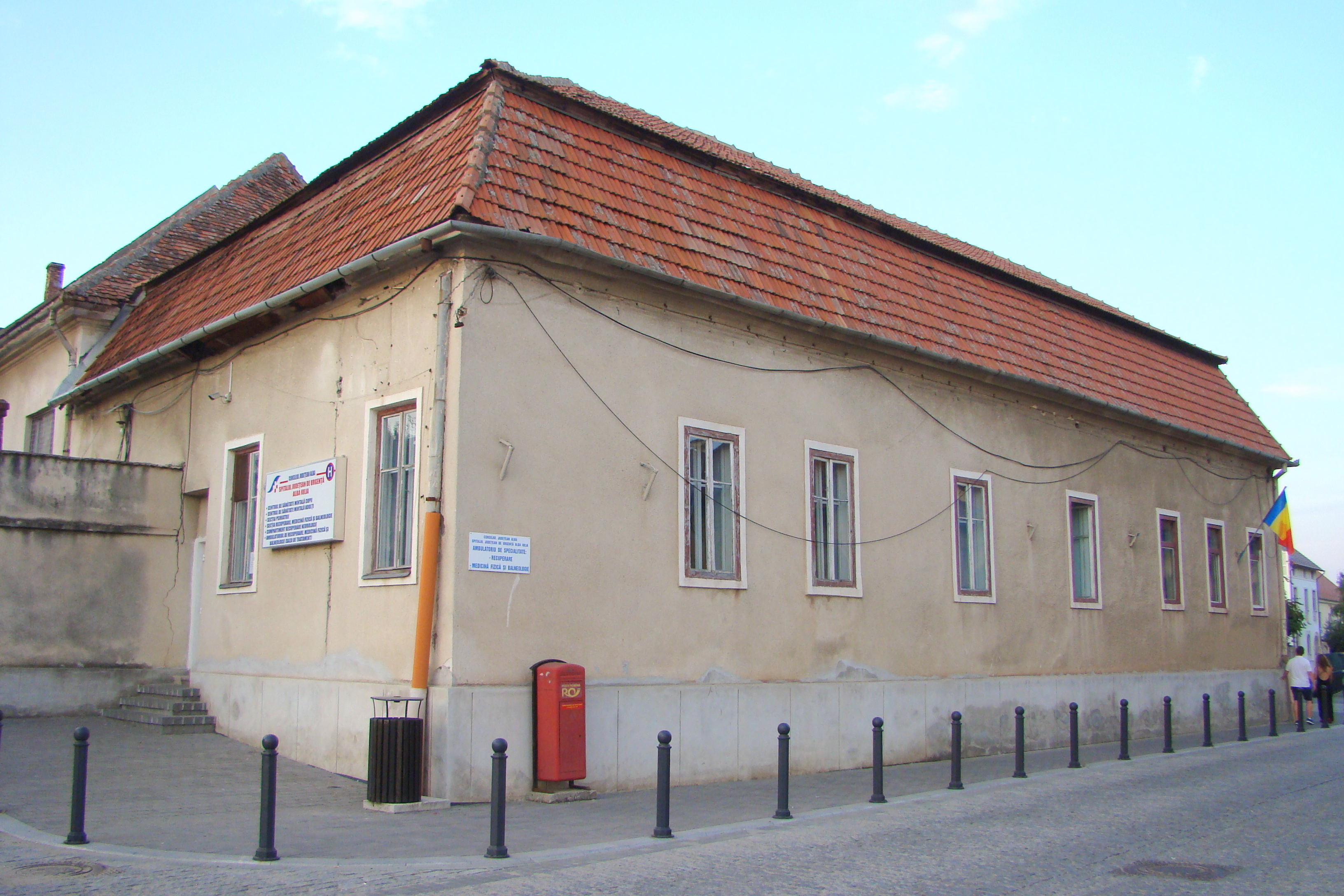 Fostul Spital militar, azi Spitalul de Neurologie și Psihiatrie, Str. Unirii 3, municipiul Alba Iulia